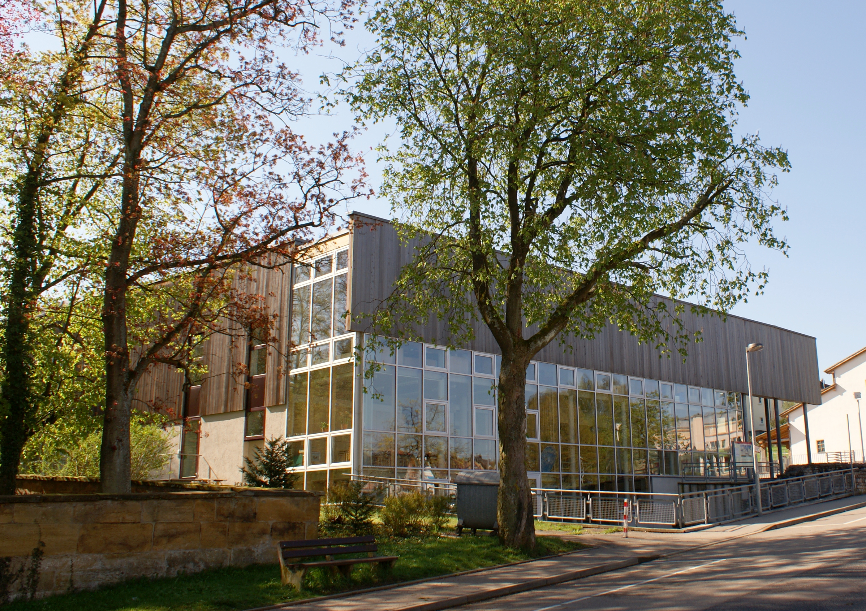 Limesmuseum Aalen, Außenansicht des Museumsgebäudes von Norden.